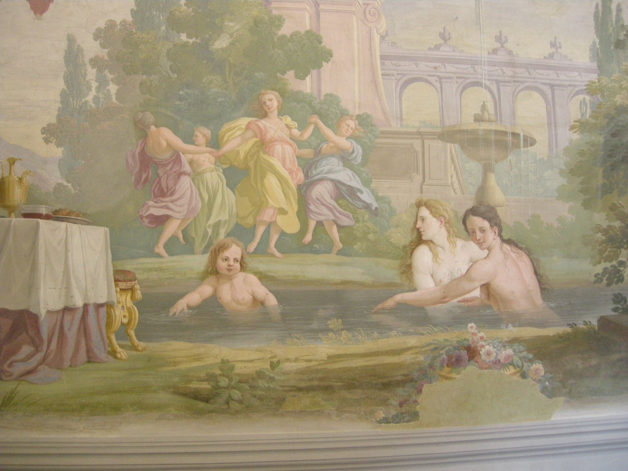 Sala della gerusalemme liberata, giardino delle ninfe